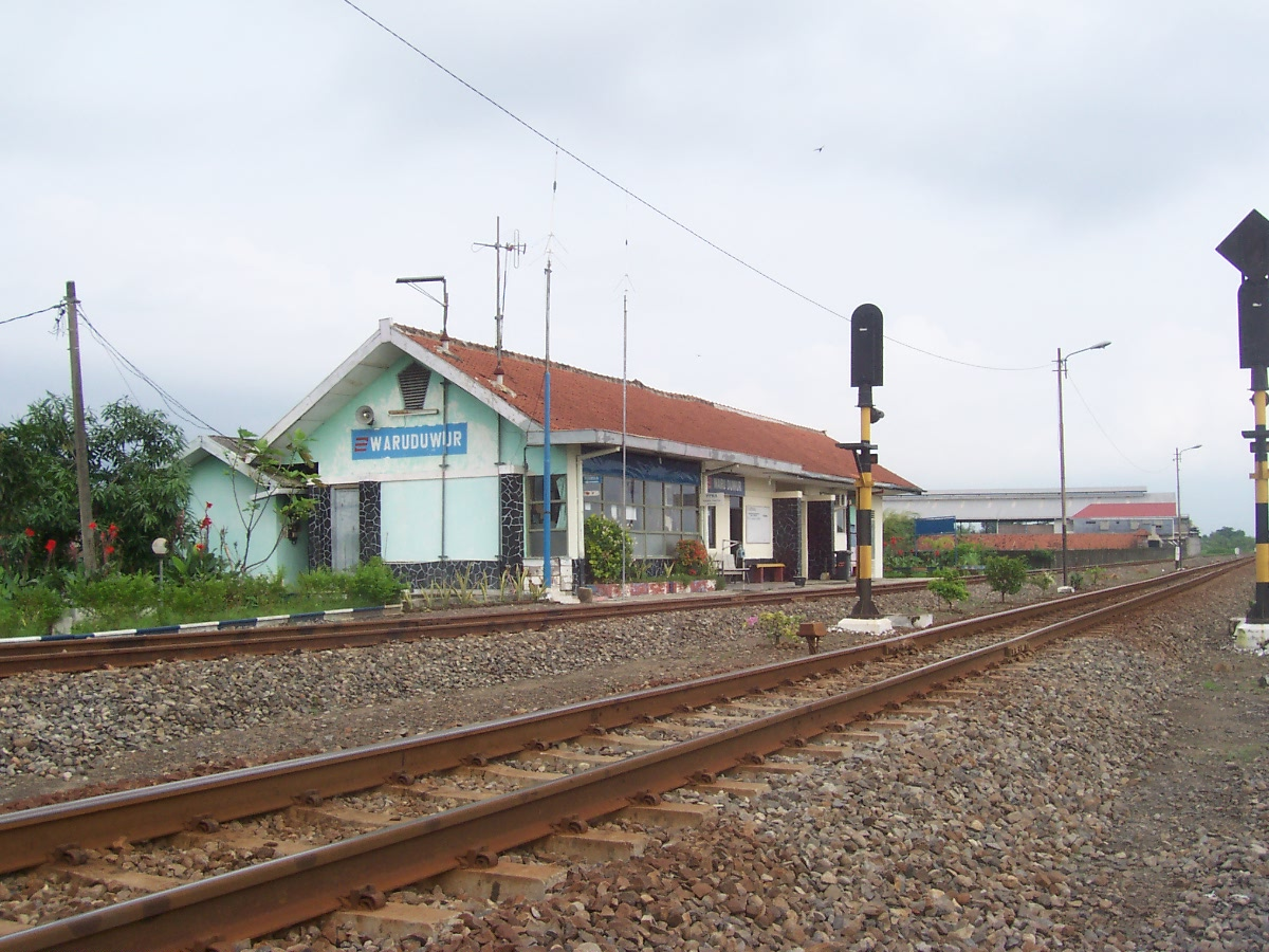 Stasiun Waruduwur